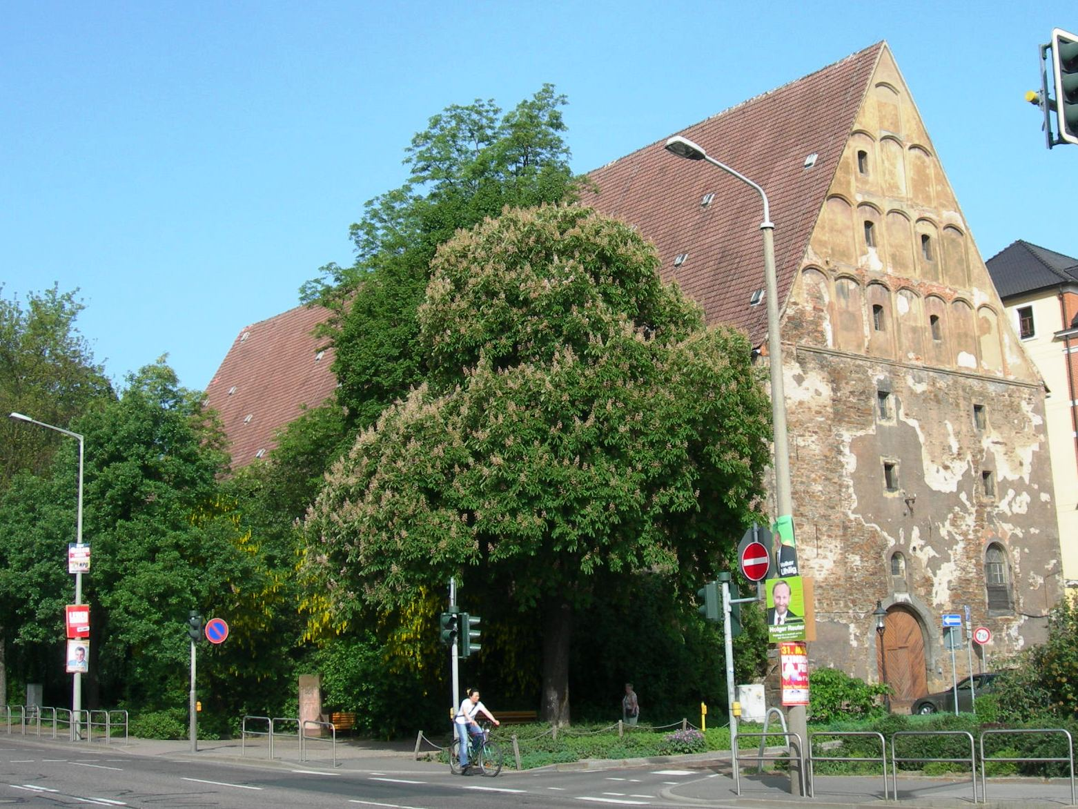 Freiberg, Kornhaus. Around 1490)